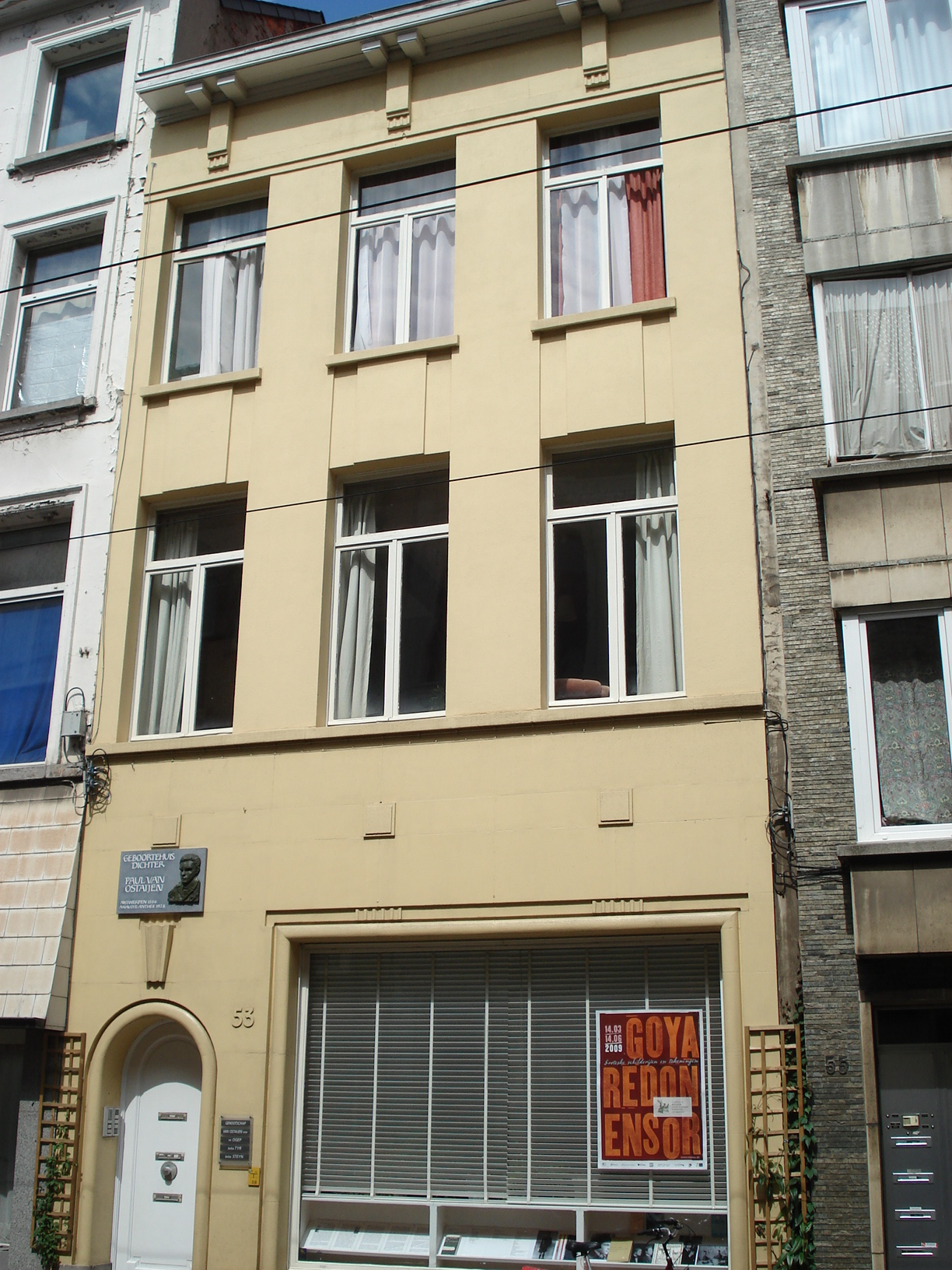 Antwerpen, wijk Klein-Antwerpen. Geboortehuis Paul van Ostaijen aan de Lange Leemstraat.